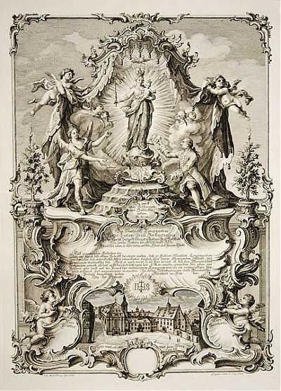 Aufnahmeblatt Marianische Kongregation Eichstätt von Maurizio Pedetti und Johann Michael Franz